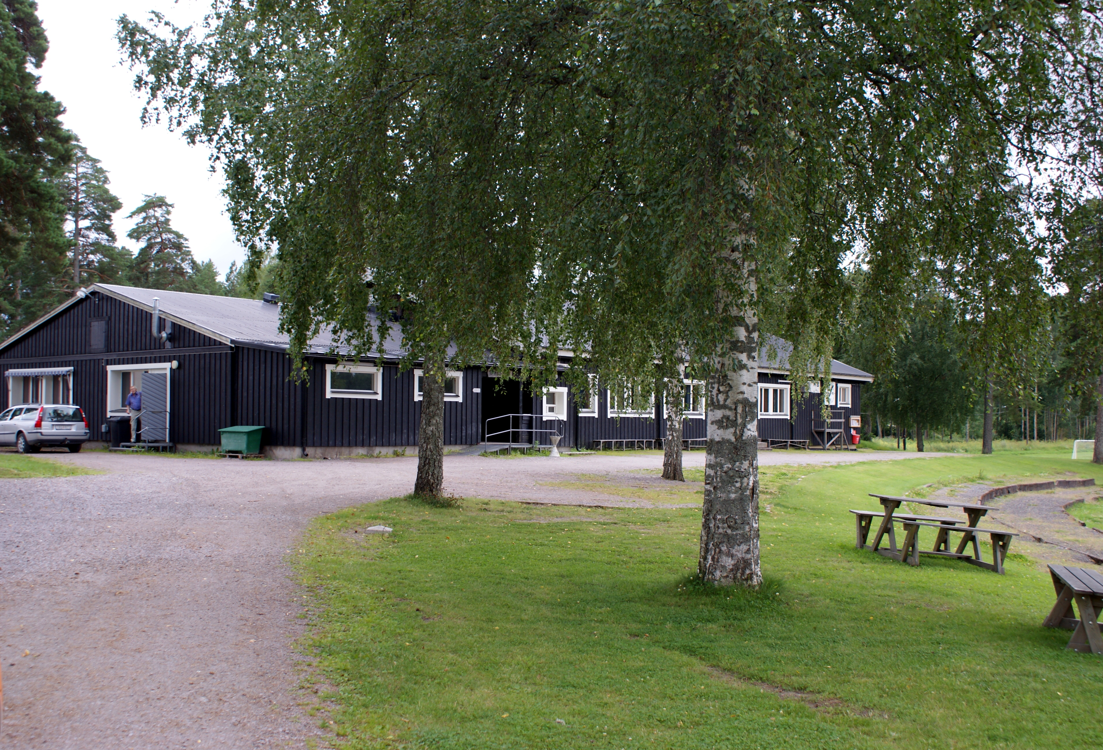 Gimo idrottsplats, cafeteria och danshall.